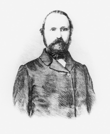 Portrait de Robert Remak (1815-1865